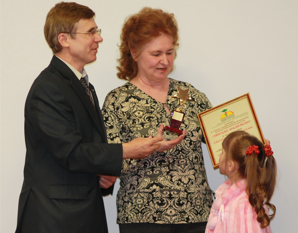 Семья Розановых получает "Звезду надежды". 28 апреля 2011 года, Вологда.